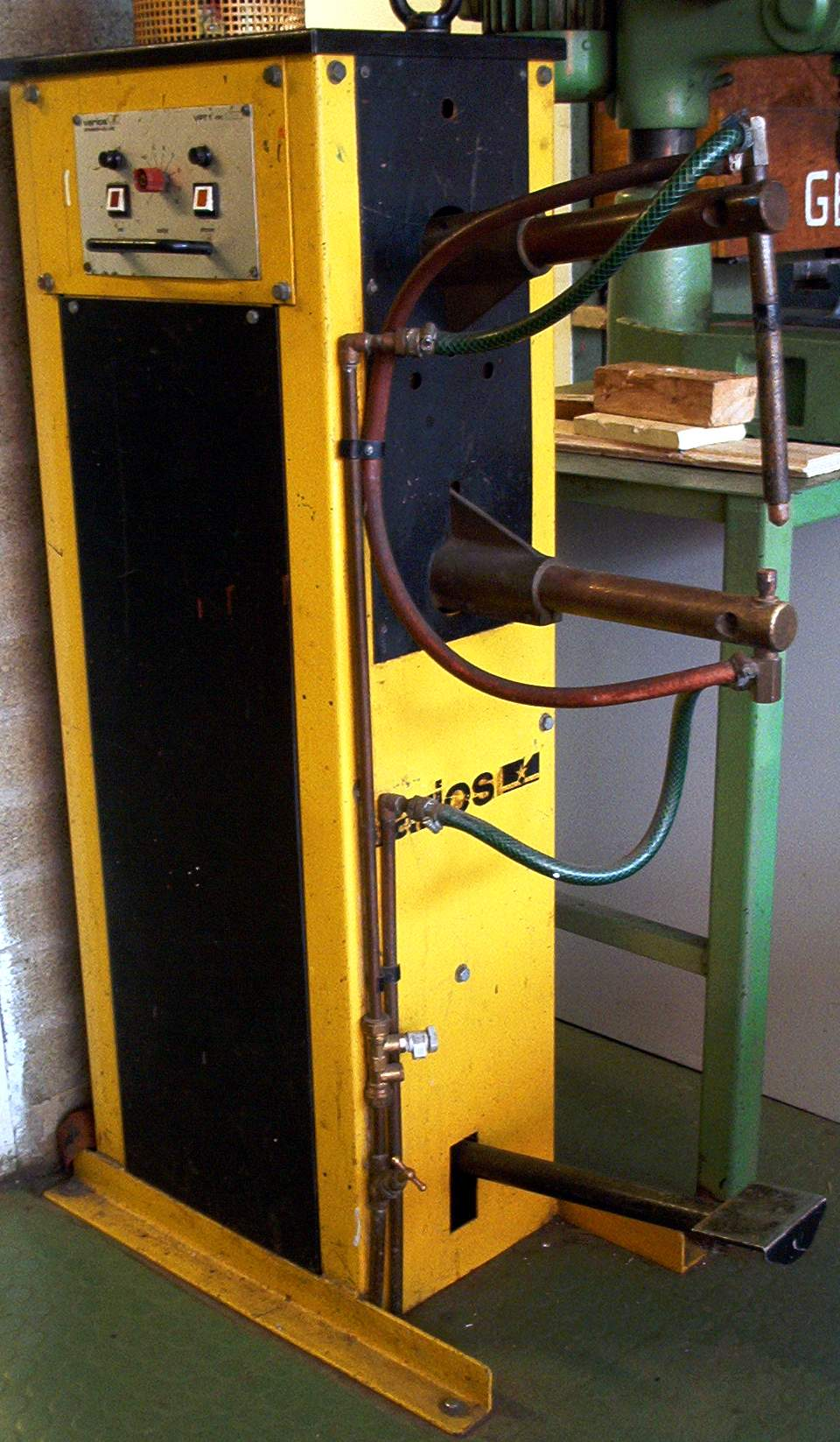 zelfgemaakte foto voor het publiek domein van Wikipedia. Martink.